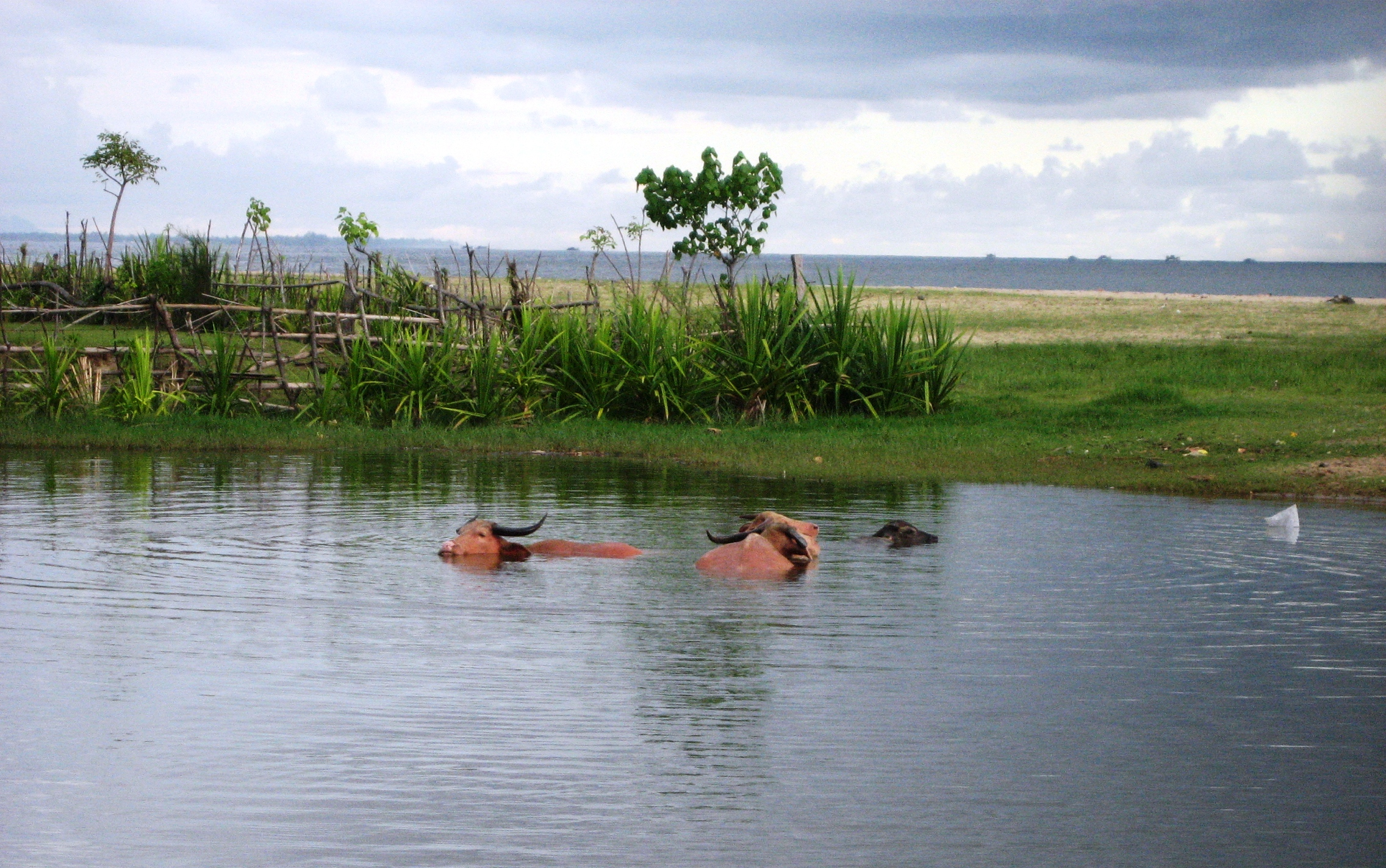 Pantai Blang Pidie